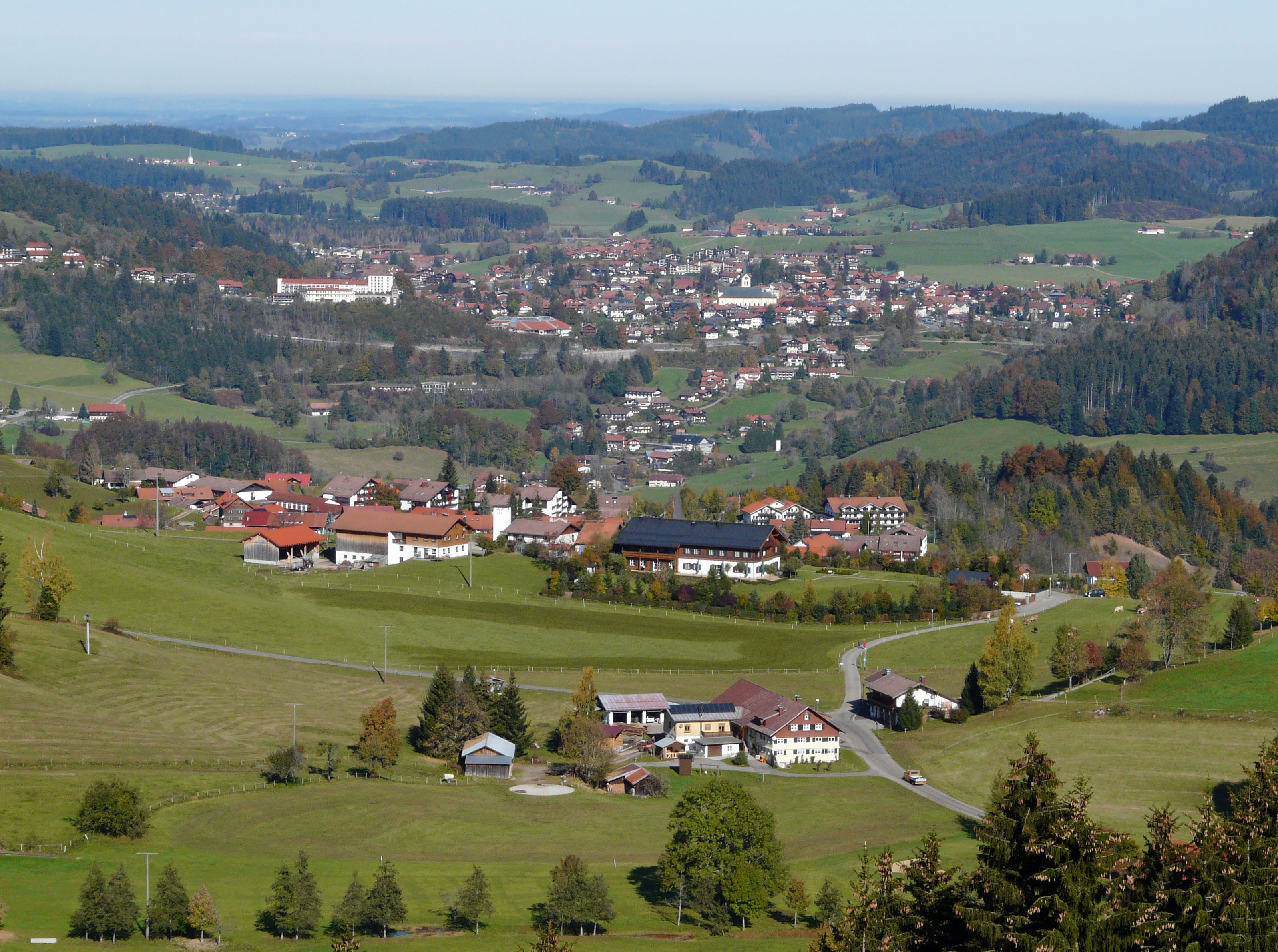 Steibis und Oberstaufen von Süden